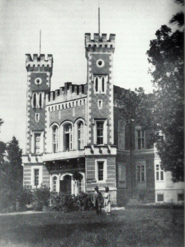 Schloss Randowshof 19. Jahrhundert, Bogschütz, Öls, Schlesien.